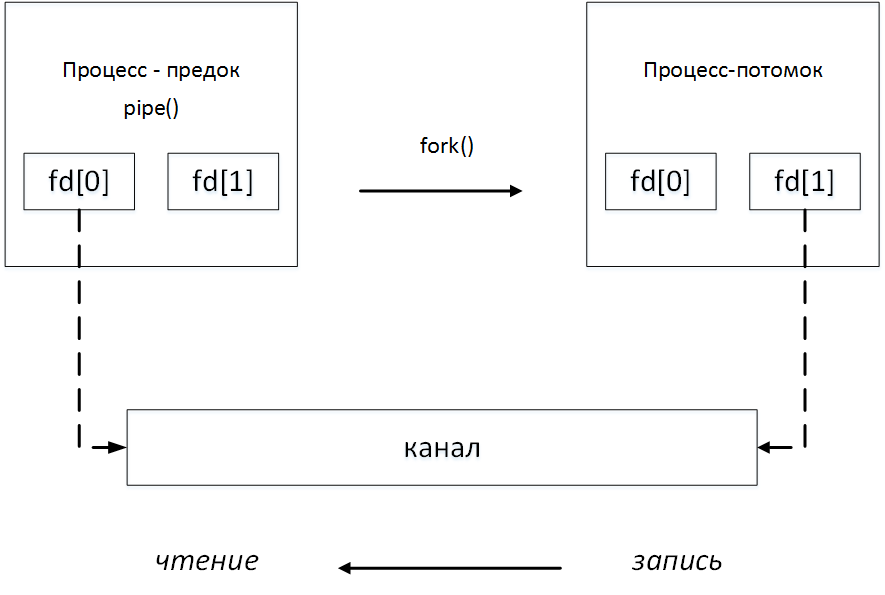 Схема взаимодействия процессов с помощью неименованного канала.